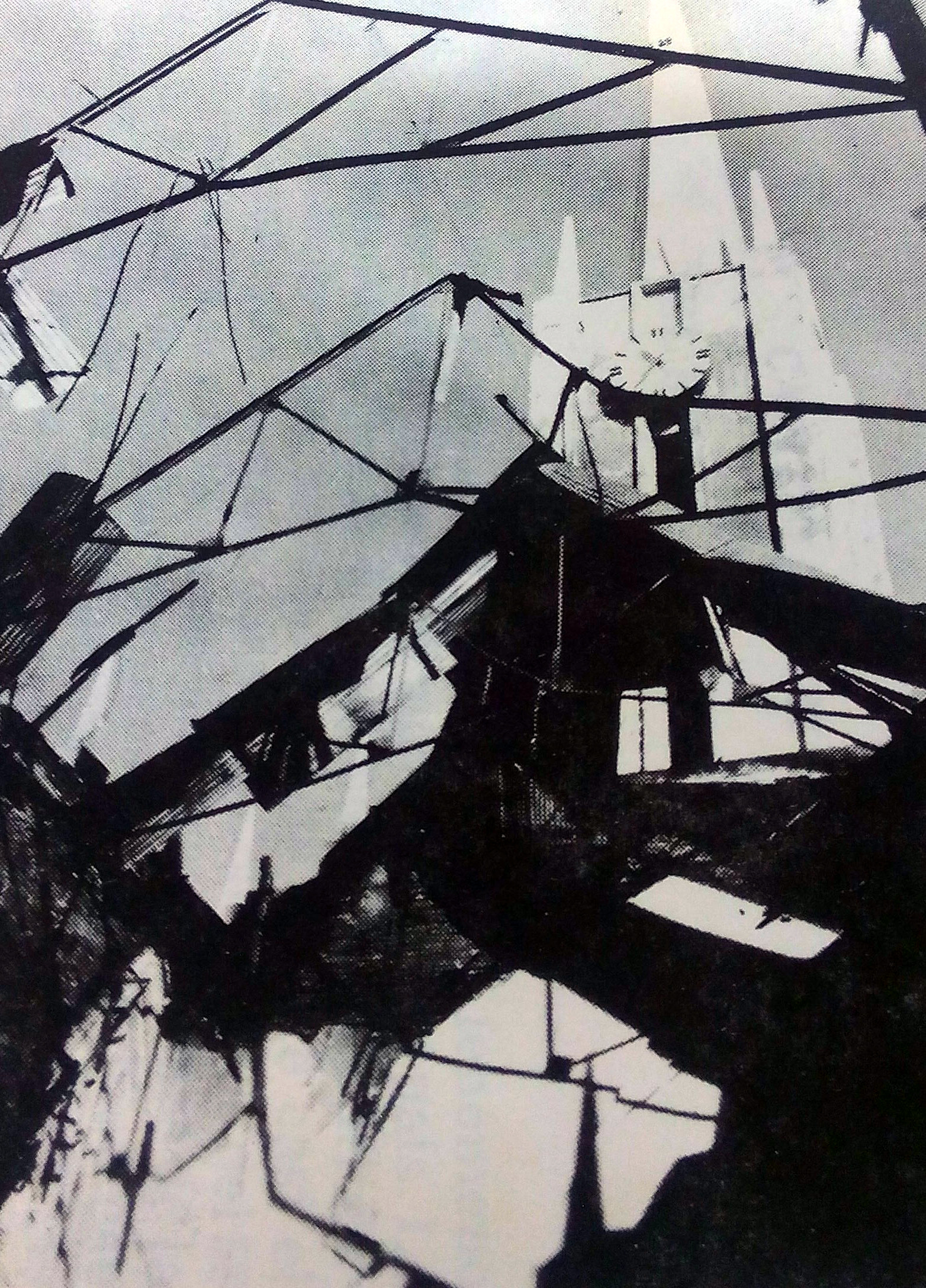 Un incendio destruye el templo San Antonio el 12 de junio de 1986 en Oberá.